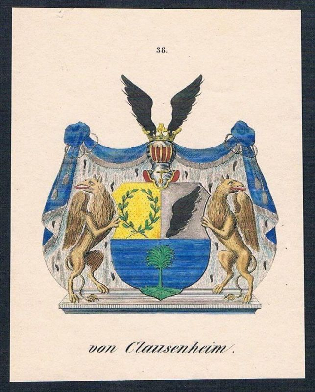 1703 verliehenes Wappen des Adelsgeschlechts (Clausen) von Clausenheim, Abb. aus Mecklenburgisches Wappenbuch. Lithographien von Johann Gottfried Tiedemann. Lithographische Anstalt, Rostock 1837–1839, Tafel 38